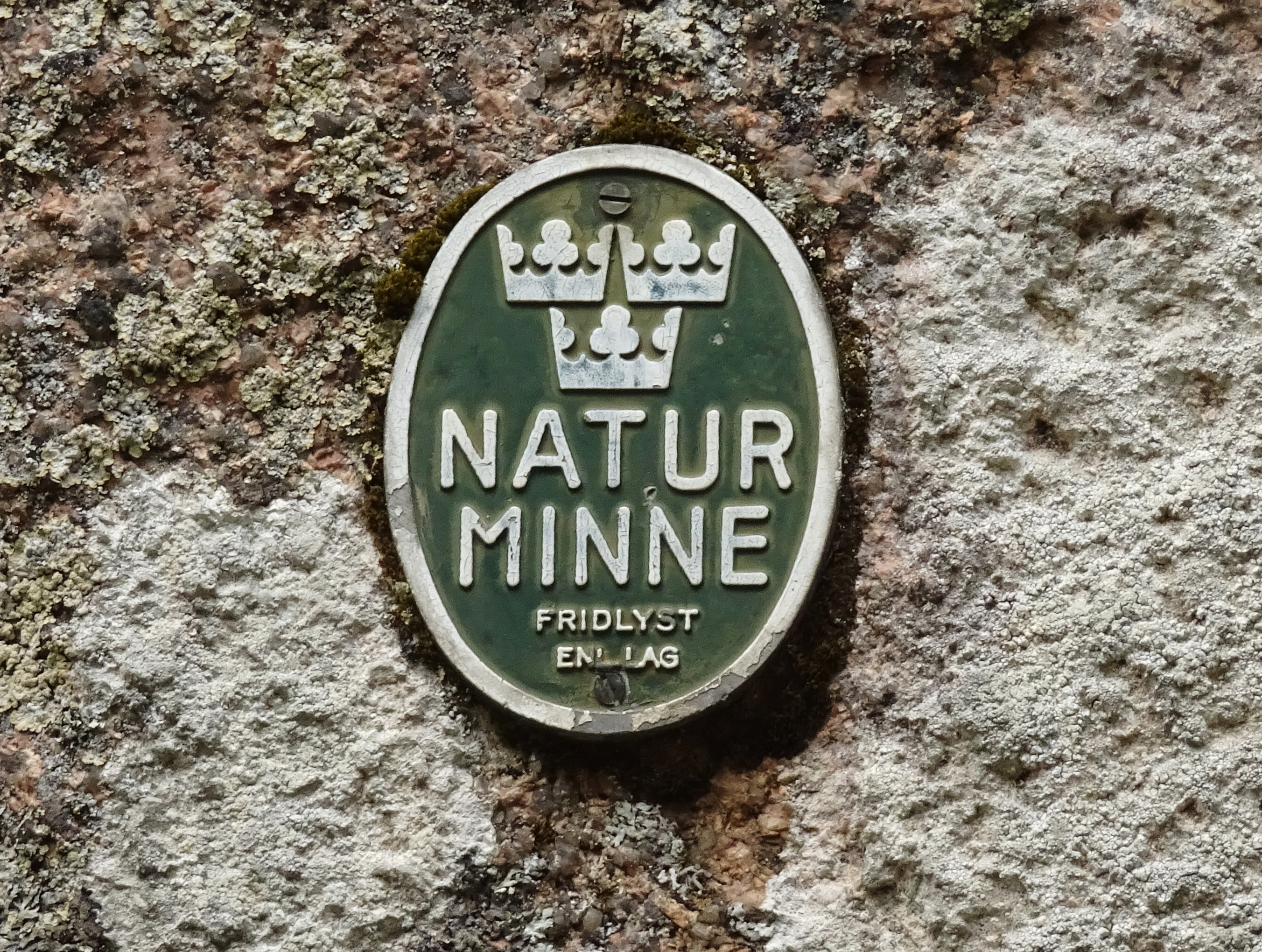 Runkesten, Rumskulla socken (RAÄ-Nummer: Rumskulla 51:1)